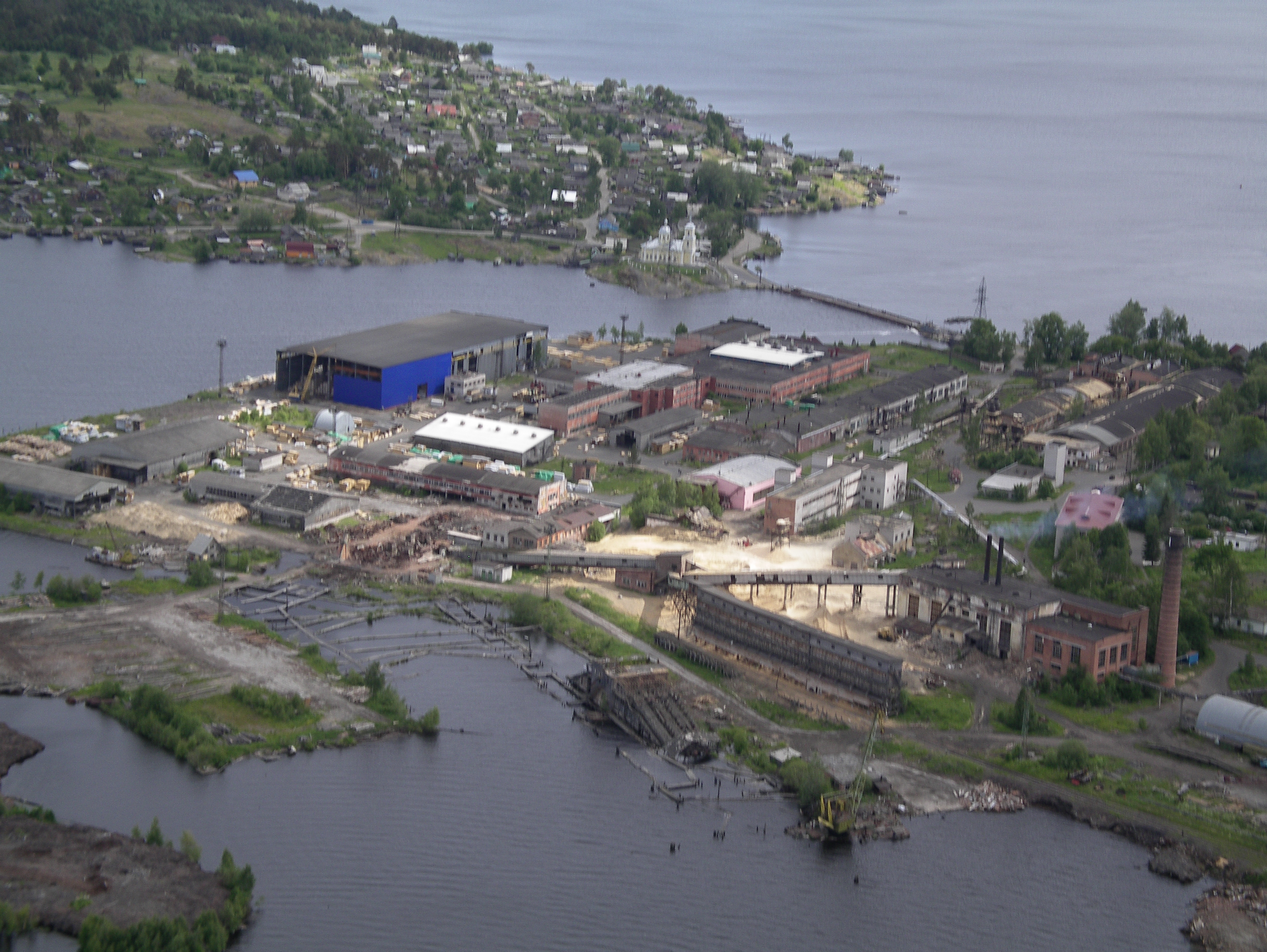 Соломенное сверху. Соломенский лесозавод. Петрозаводск